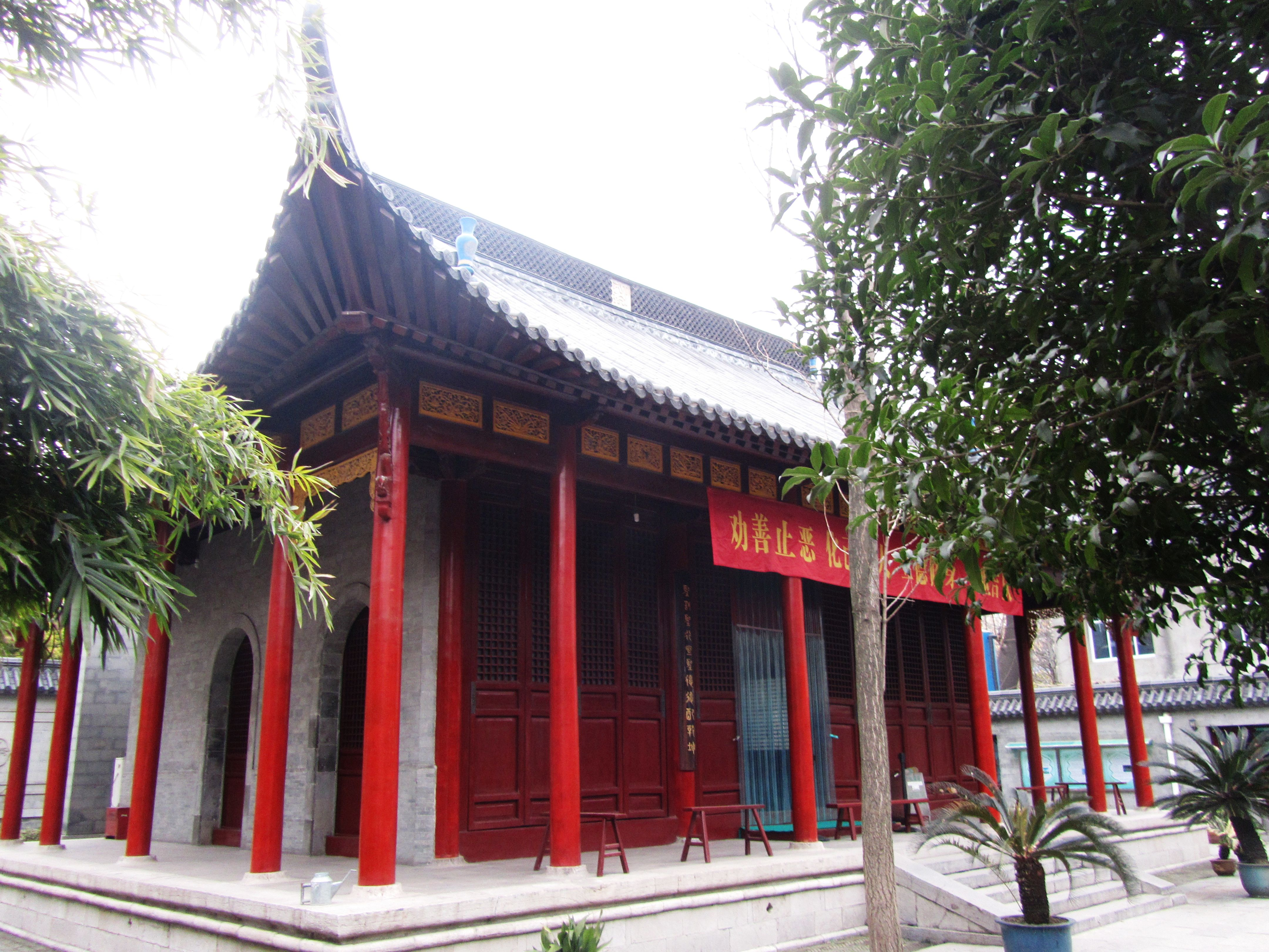 南京草桥清真寺，从西南角看大殿。